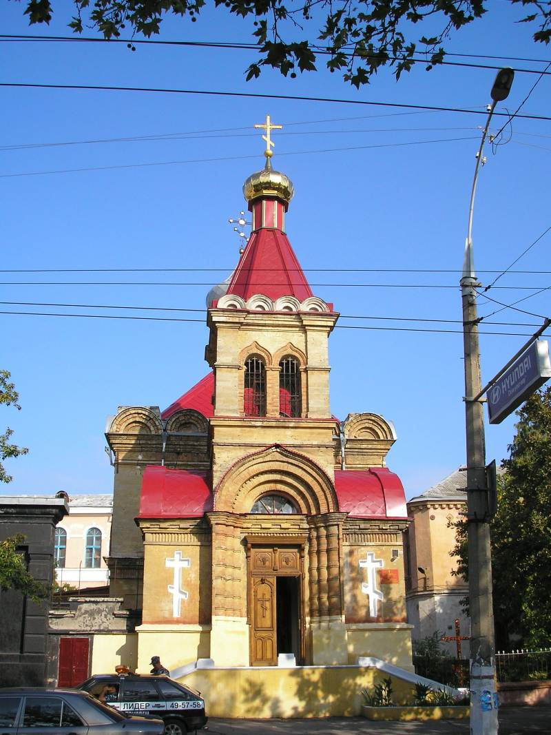 Sv_Oleksandry_Herson.jpg: Храм св. мучениці Олександри УПЦ КП, м. Херсон (Херсонська область)